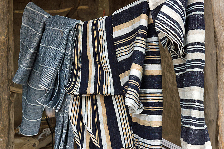 Tissages de cotons indigo fabriqués dans la région d'Oury This is an image of Cultural Fashion or Adornment from Burkina Faso